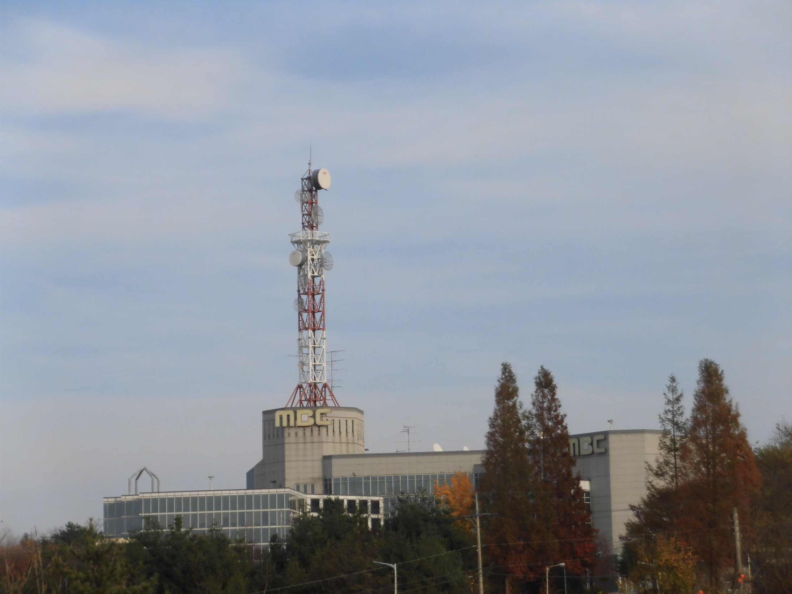 강원도 삼척시에 있는 MBC영동 삼척지사